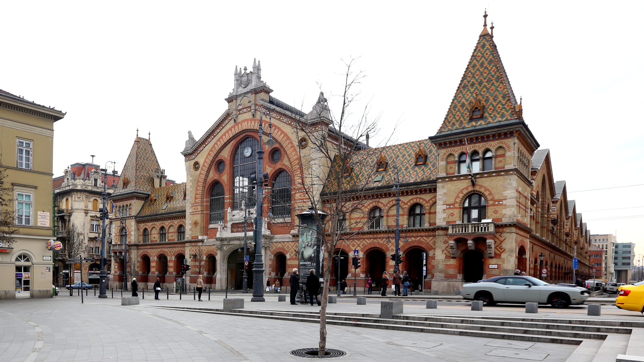 Vásárcsarnok